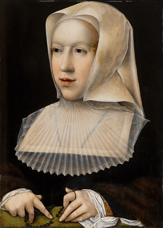 Ce portrait de Marguerite d'Autriche, par son peintre officiel, Bernard Van Orley (1488-1541), fait partie de la collection du musée du monastère royal de Brou. On en connaît sept répliques, mais cette version est sans doute la plus belle, par la finesses des carnations, la transparence des tissus et le mouvement délicat des doigts égrenant le chapelet.